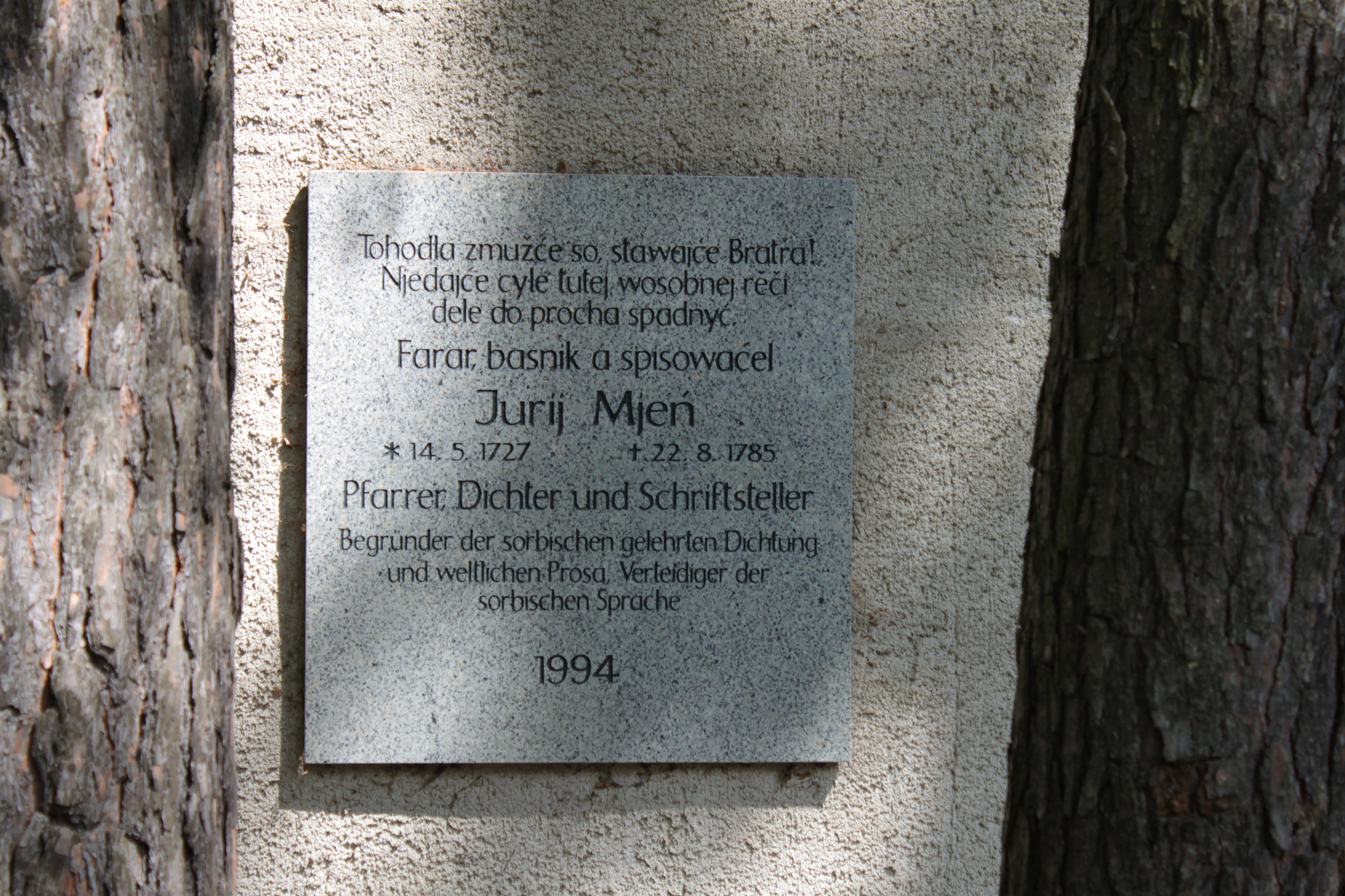 Hornjoserbsce: Wopomnjenska tafla za fararja Jurja Mjenja na starym Njeswačanskim kěrchowje.